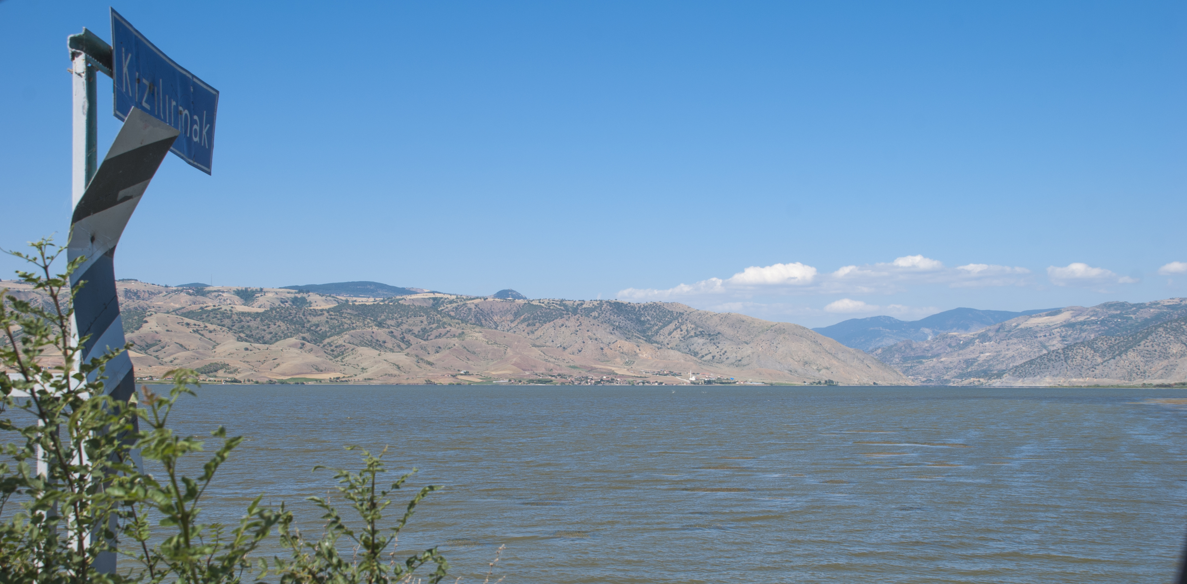 Çorum-İskilip yolu üzerinde Obruk Baraj Gölü